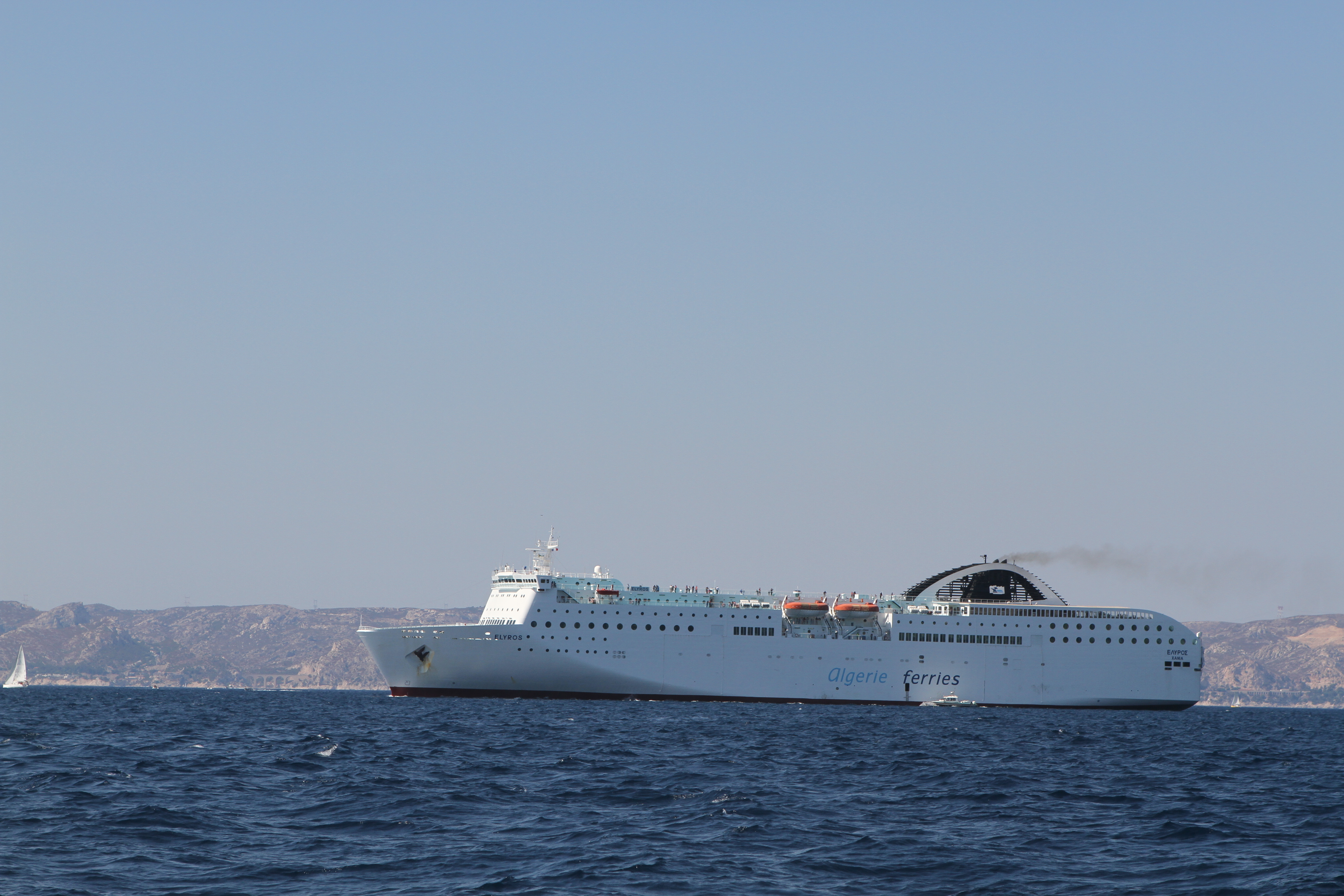 Le navire grec Elyros, affrété par Algérie Ferries, quittant le port de Marseille (France)